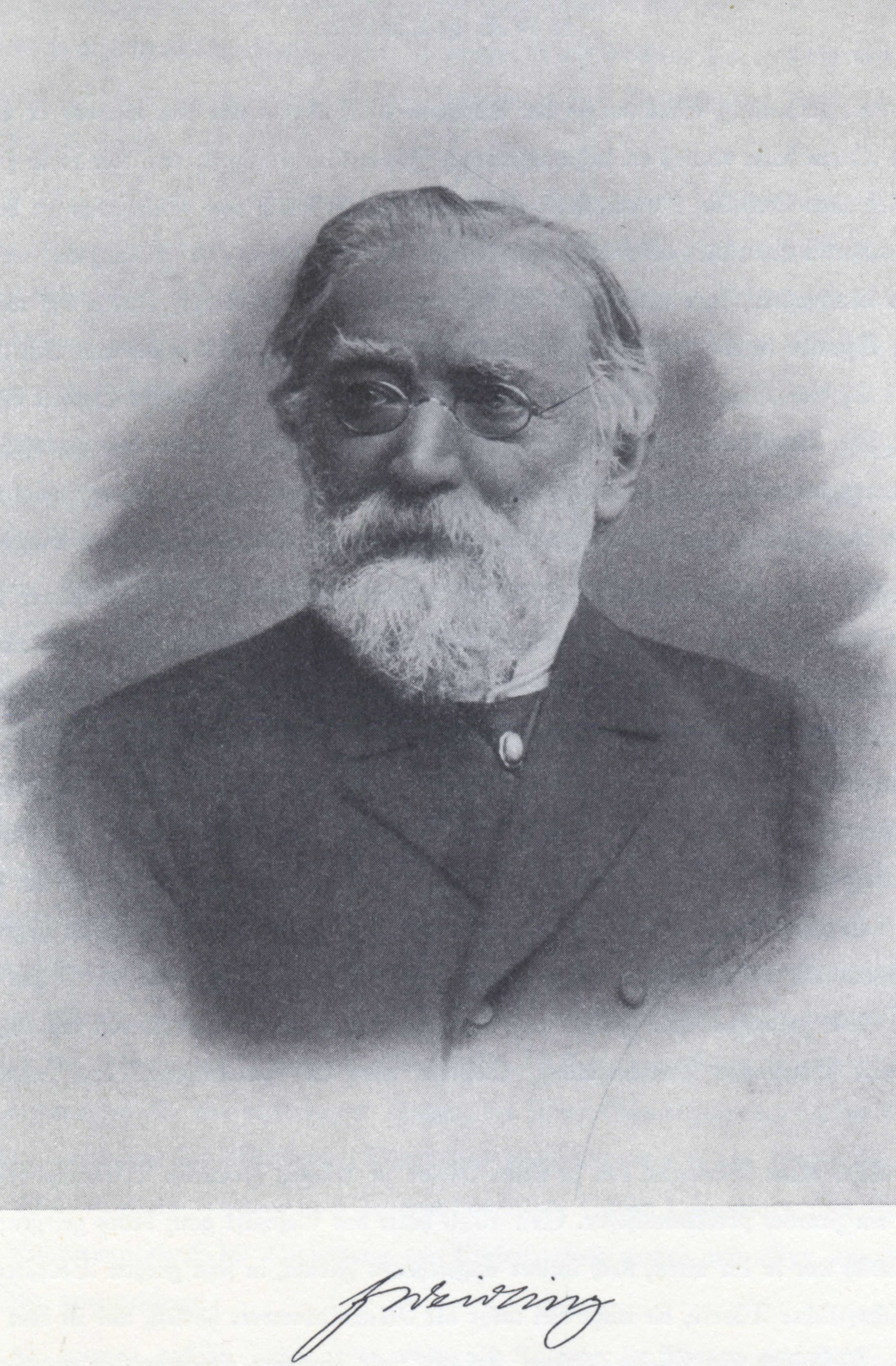 Porträtfoto des Verlegers Friedrich Weidling